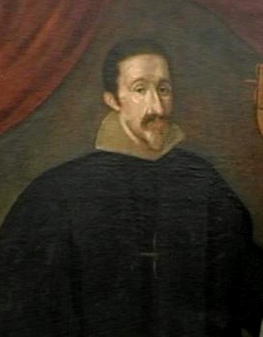 Retrato de José González de Uzqueta (1583-1668). Iglesia de Santa Eulalia, en Arnedo (España).